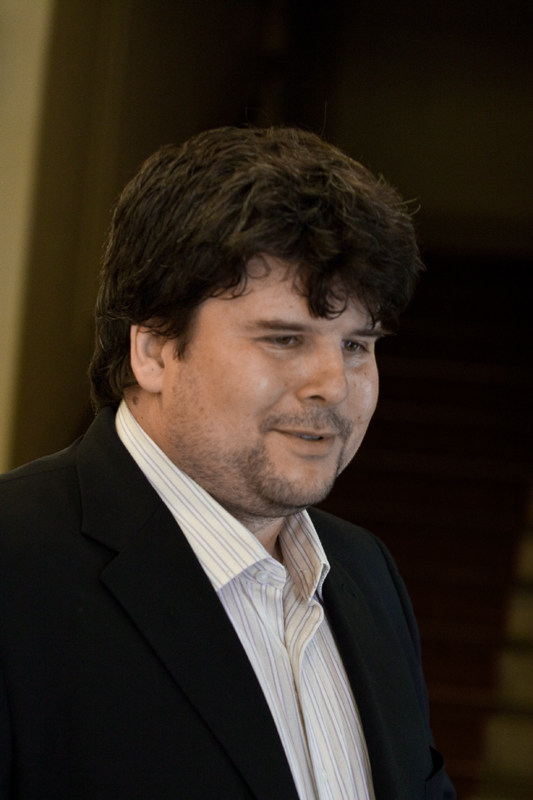 Ředitel Gymnázia v Kadani 2012